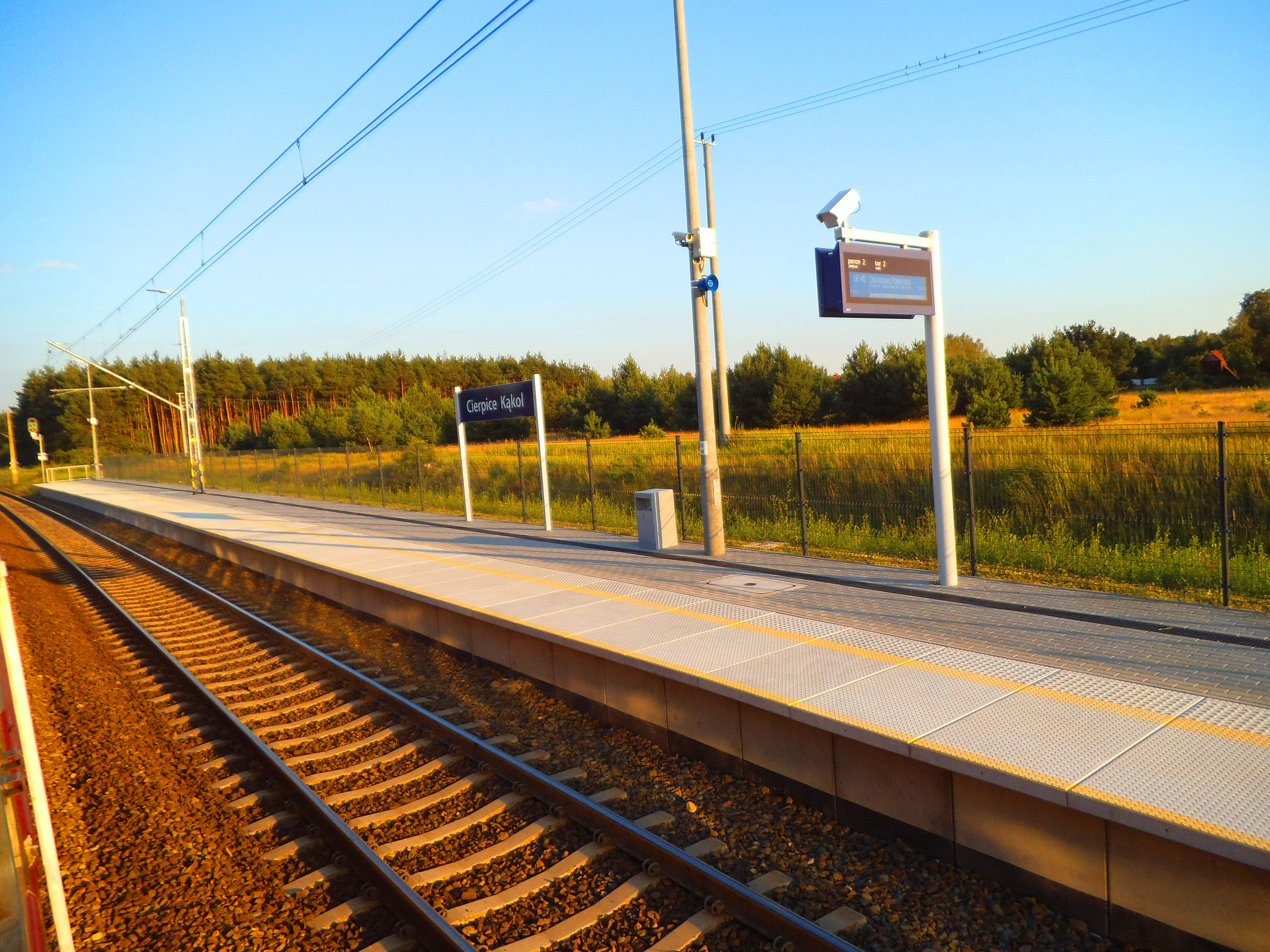 Cierpice Kąkol